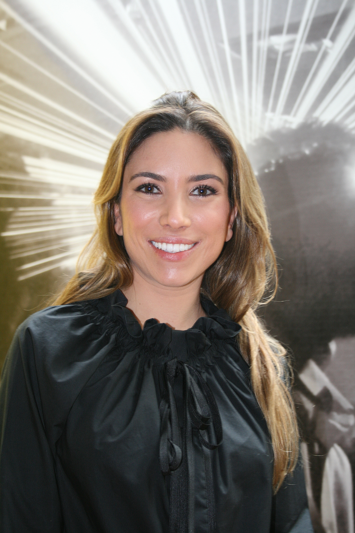 Patricia Abravanel apresentou á imprensa os detalhes do Verão no Hotel Jequitimar.Além dos shows de NX zero,Pitty,Fresno,etc,o teatro vai estar presente também.Com o apôio do SBT,dos patrocinadores e da prefeitura do Guarujá,Patricia e o empresário Poladian prometem agitar o Verão no Guarujá.